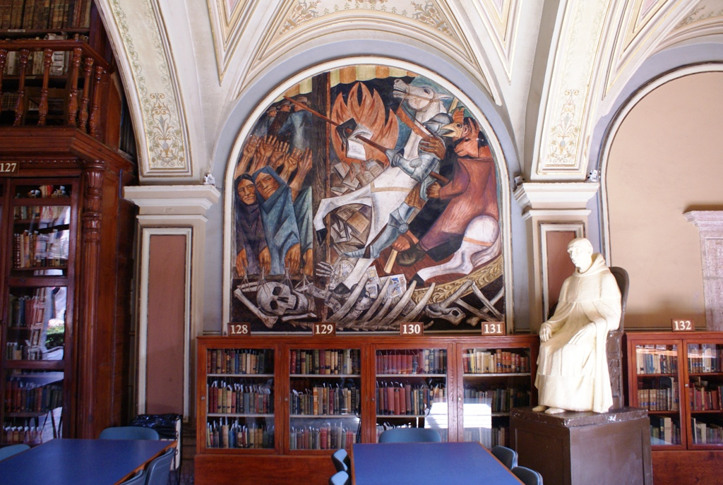 Biblioteca Pública de la Universidad Michoacana ubicada en Av. Madero Poniente esquina con Nigromante, Centro Histórico de Morelia, Michoacán, México. Fundada en 1930, conserva un fondo bibliográfico antiguo de 22,901 volúmenes, que van desde el siglo XV hasta principios del siglo XX. El edificio donde tiene su sede la biblioteca fue un templo de los Jesuitas durante la época del Virreinato de la Nueva España, construido en el siglo XVII en estilo barroco. En su interior la biblioteca conserva murales al fresco pintado a mediados del siglo XX por los artistas estadounidenses Hollis Howard Holbrook, S. C. Schoneberg y R. Hansen así como del mexicano Antonio Silva Díaz.